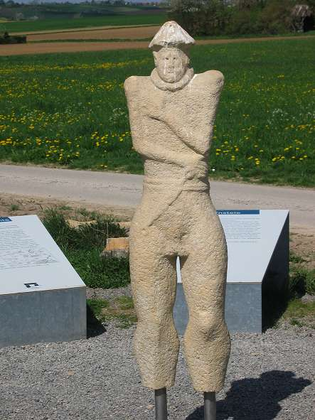 Mann von Hirschlanden Keltische Statue; älteste lebensgroße plastische Darstellung eines Menschen in Mitteleuropa, Nachbildung einer Statue aus der Zeit um 500 vor Christus. Fotografiert von Mussklprozz am 2004-04-24. GNU-FDL